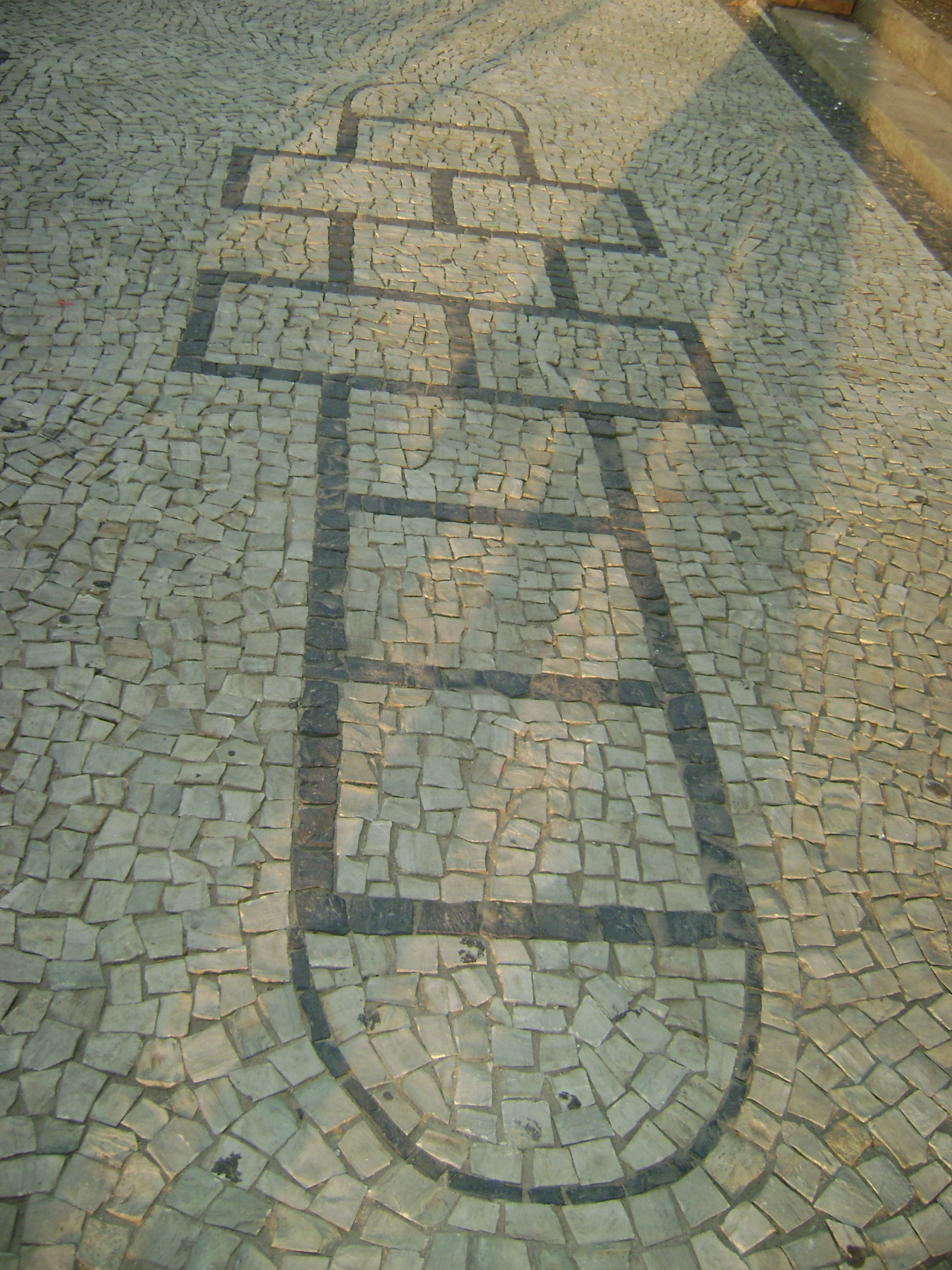 Jogo de Amarelinha em pátio na entrada do campus I do Centro Federal de Educação Tecnológica de Minas Gerais, em Belo Horizonte, Brasil.